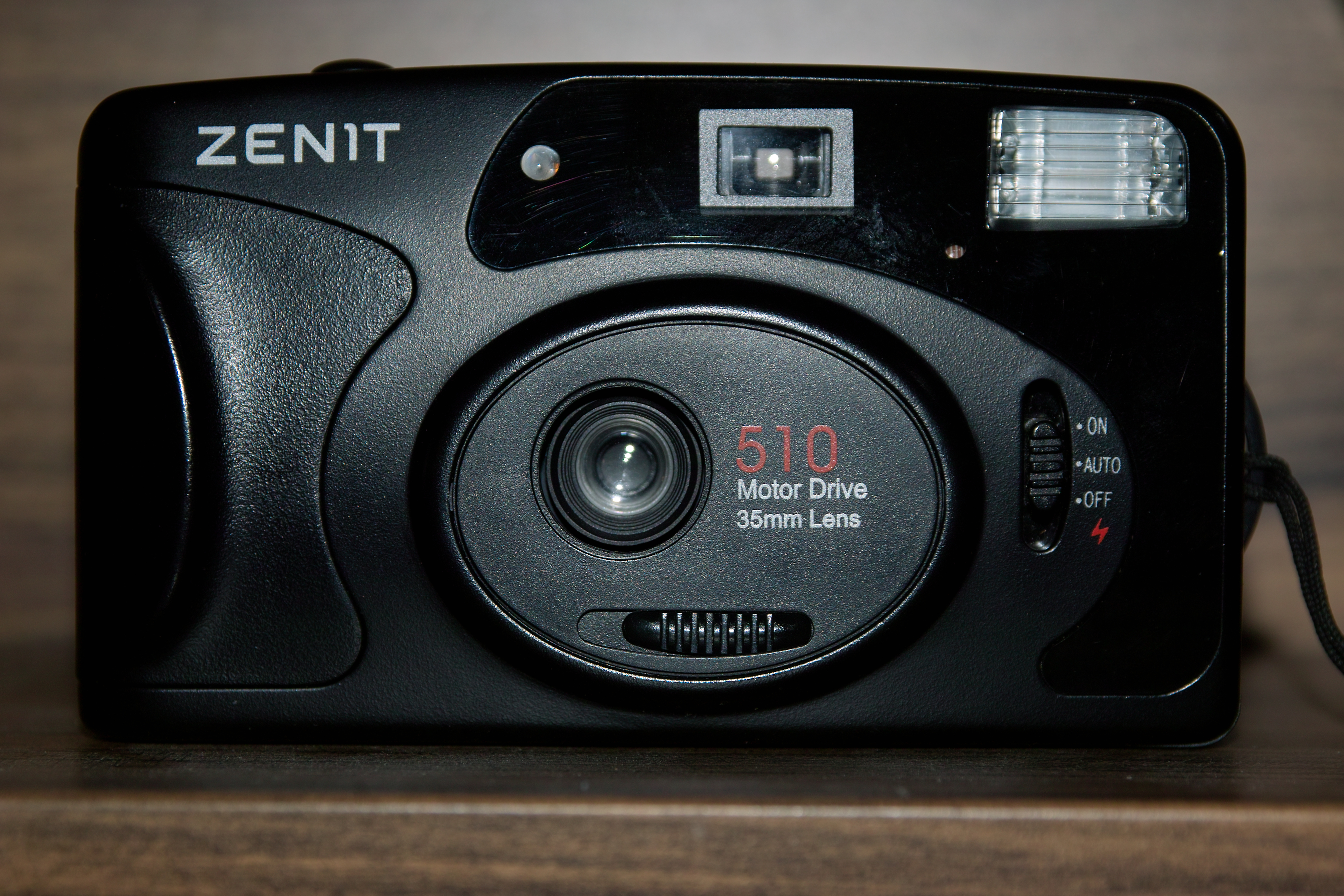 Компактный фотоаппарат Зенит 510